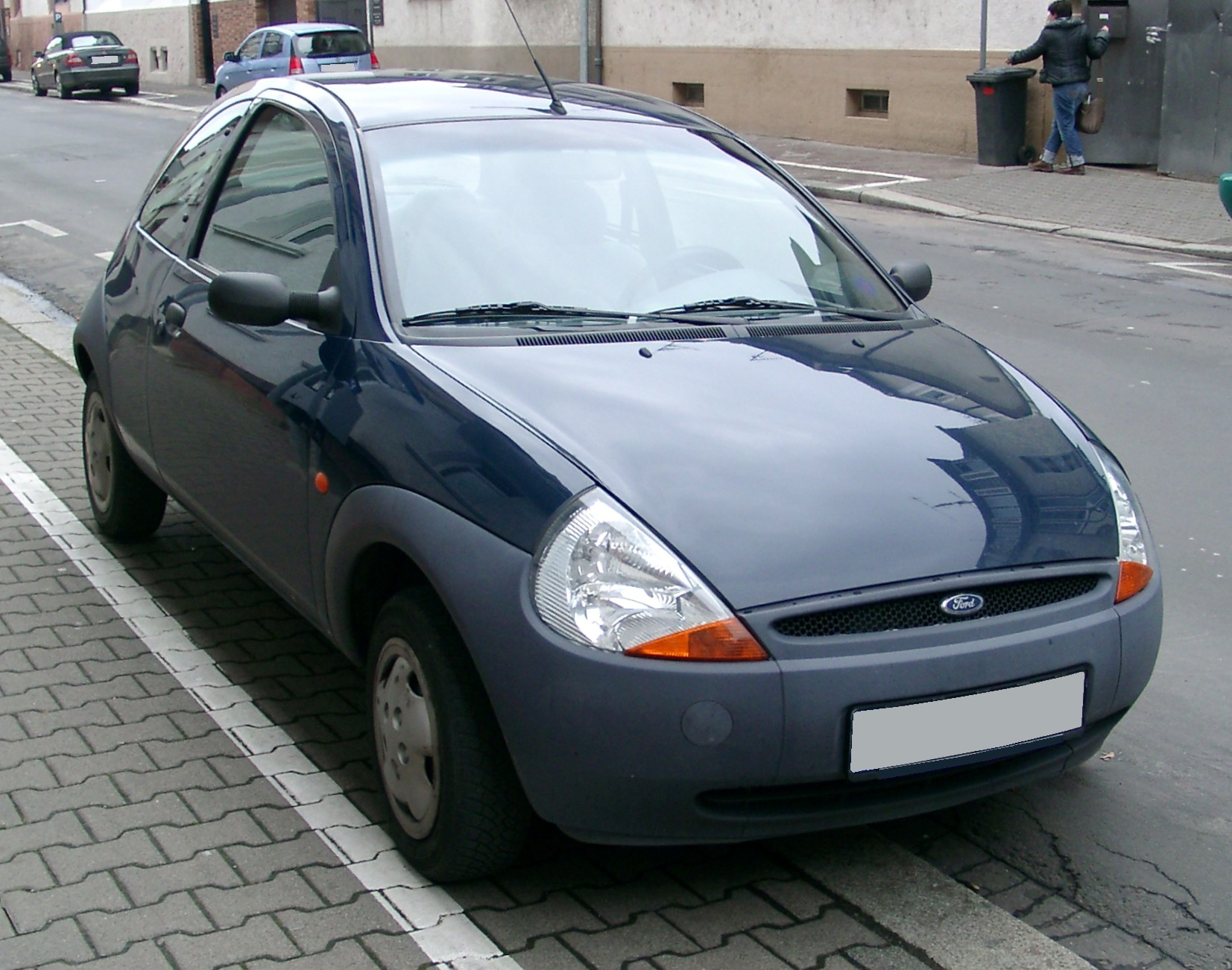 Ford Ka